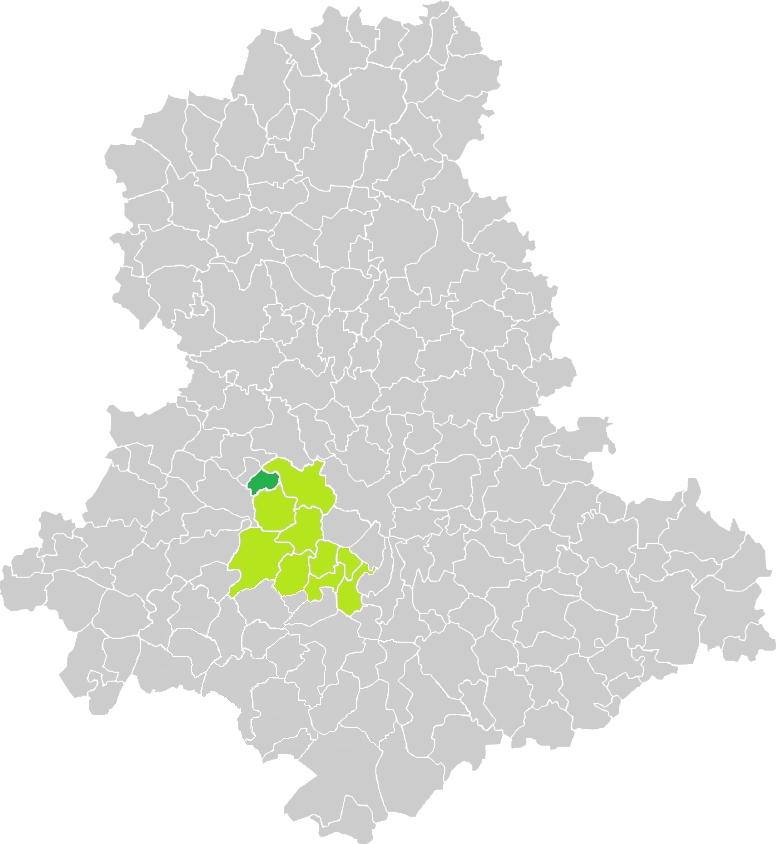 Carte de situation de la commune de Saint-Yrieix-sous-Aixe (en vert foncé) dans le votre Canton (en vert clair) sur une carte des communes de la Haute-Vienne